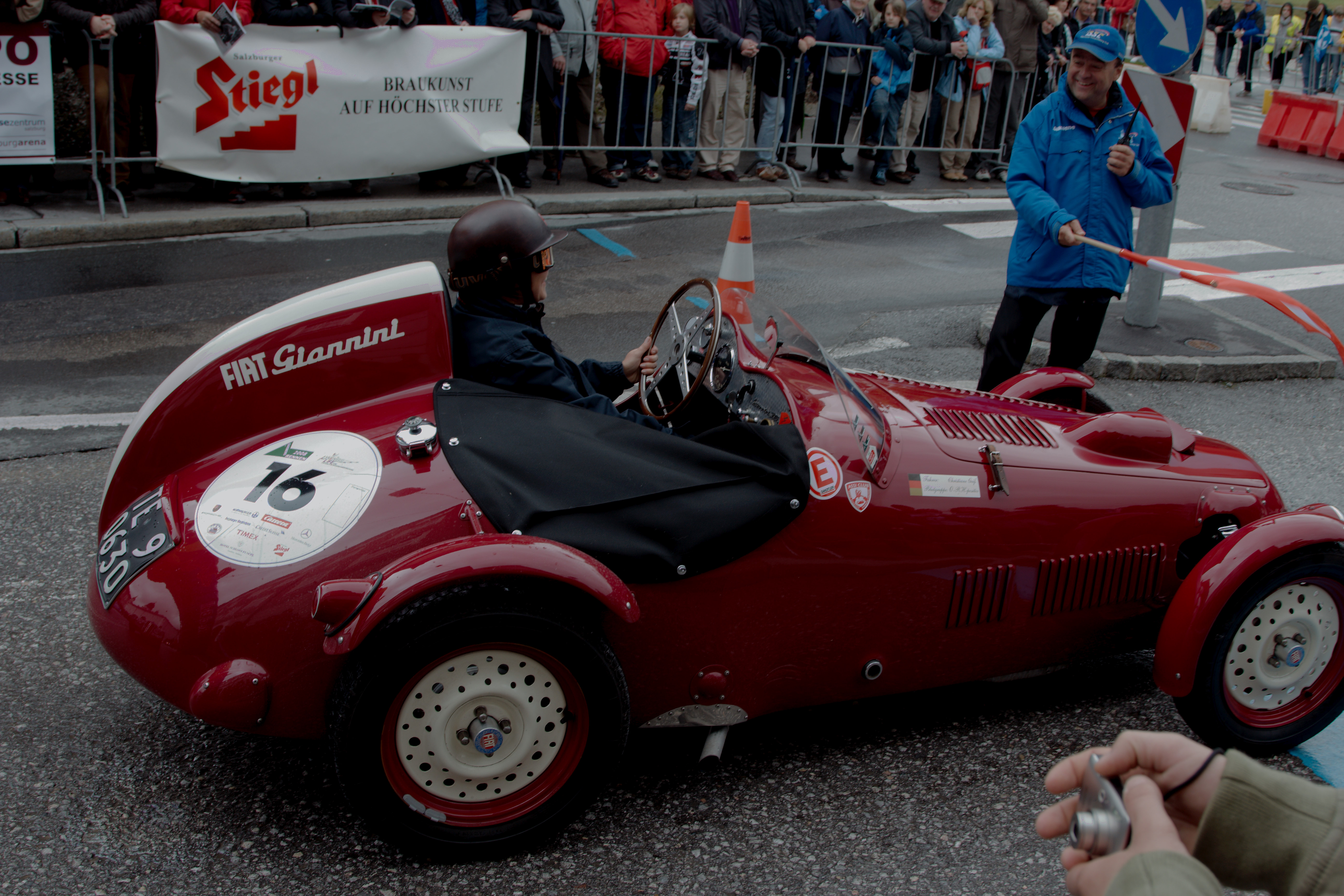 Gaisbergrennen 2010 Stadtfahrt, Giannini Fiat 500 A (1939)